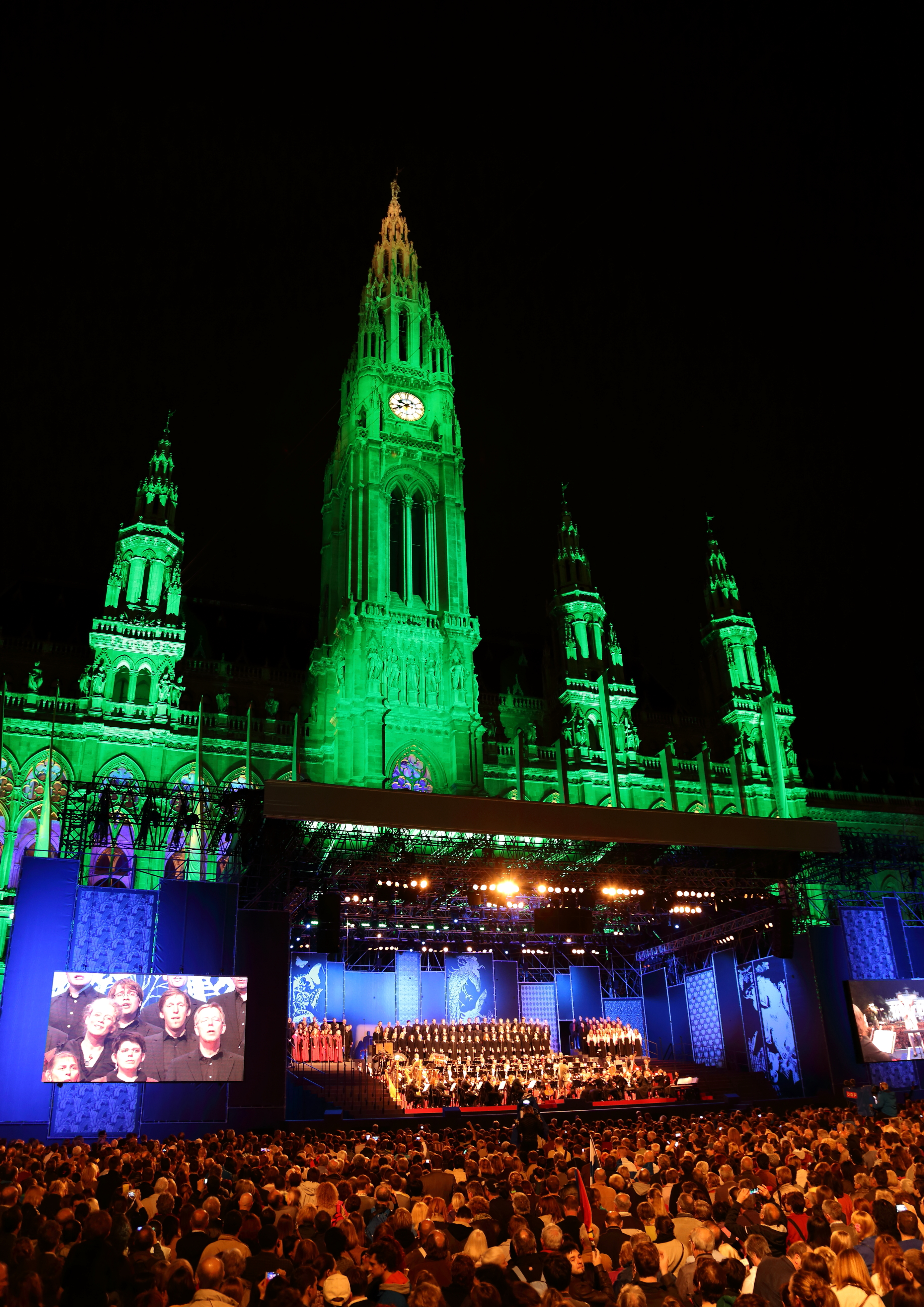 Eröffnungsveranstaltung der Wiener Festwochen 2014 am 9. Mai mit dem Arnold Schoenberg Chor und dem Radio-Symphonieorchester Wien unter der Leitung von Cornelius Meister. An Gastchören nahmen teil: BNR Mixed Coir aus Bulgarien, Concordia Discors aus Kroatien, coro siamo aus Österreich, Euga aus Finnland, La Maîtrise de Paris aus Frankreich, Liepaites aus Litauen, Sola aus Lettland und Vox Bona aus Deutschland. Die Moderatoren Cornelius Obonya und Alice Tumler führten durch die Veranstaltung.